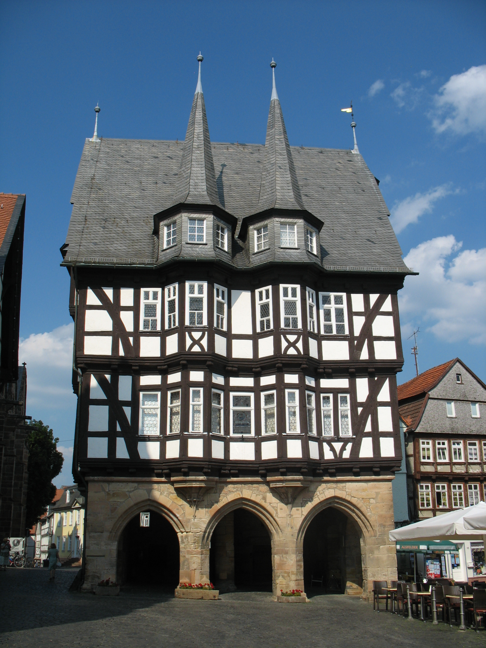 Rathaus Alsfeld.